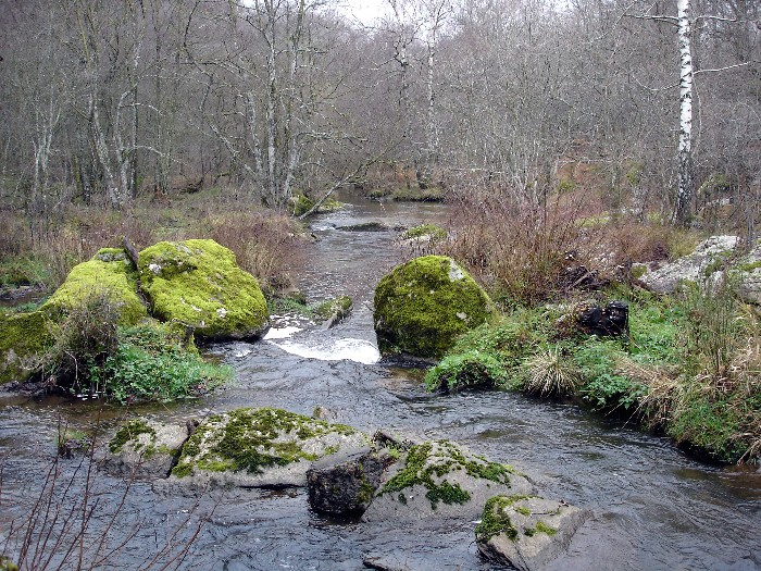 Le ruisseau du Vioulou